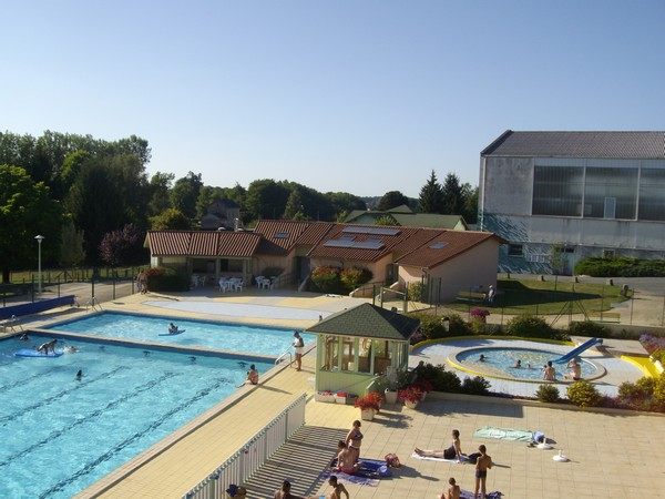 Châlus (Haute-Vienne), la piscine